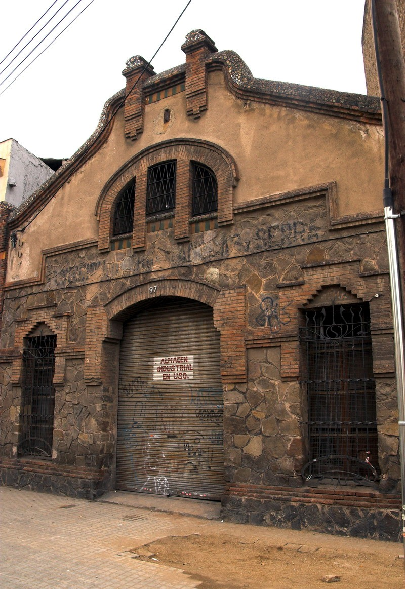 Magatzem industrial (Barcelona-Catalunya), obra de Joaquim Raspall 1907. C/Pujades, 97. Vista exterior.